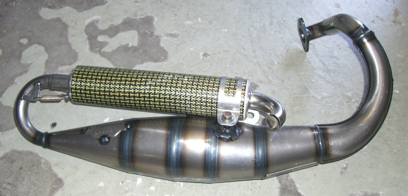 Scooter exhaust Yasuni R für Piaggio